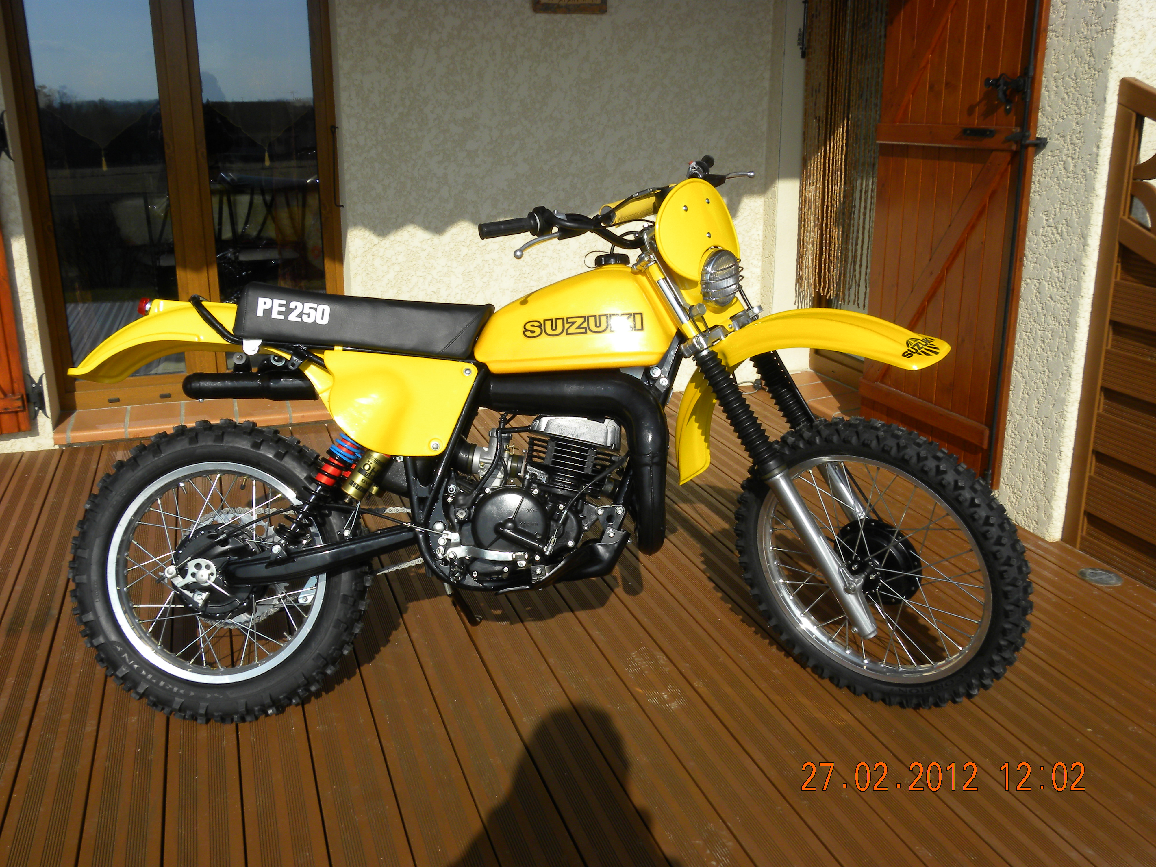 photo de ma SUZUKI PE 250 N